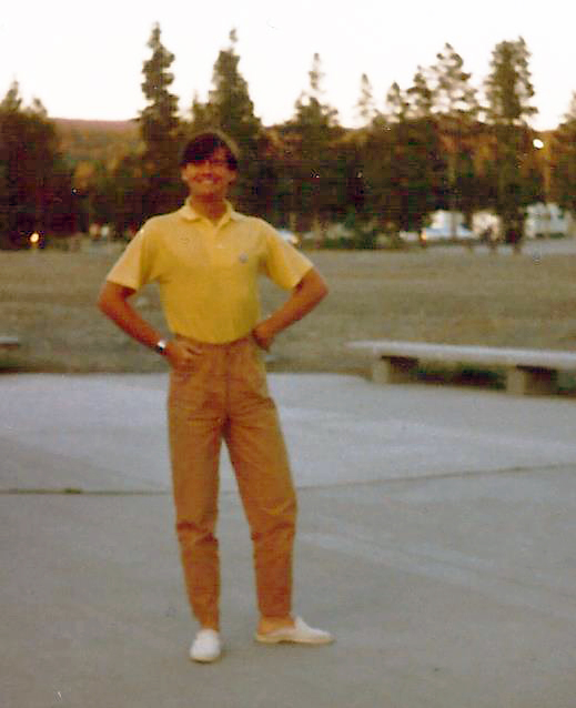 Popper im Sommerlook mit gelbem Poloshirt, Benetton-Karottenhose und Leinenschuhen